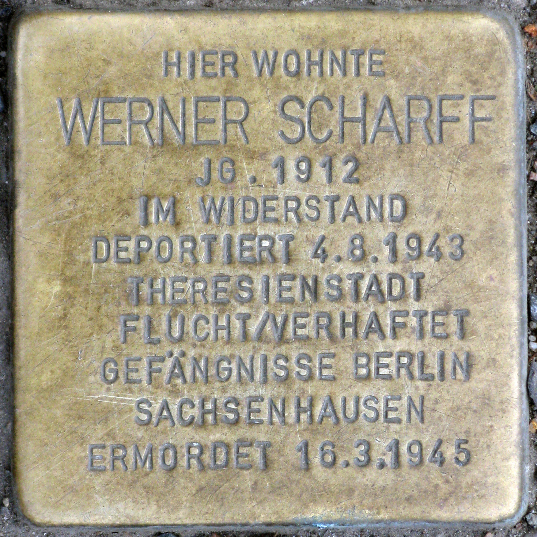 Stolperstein für Werner Scharff, Gitschiner Straße 71, Berlin-Kreuzberg